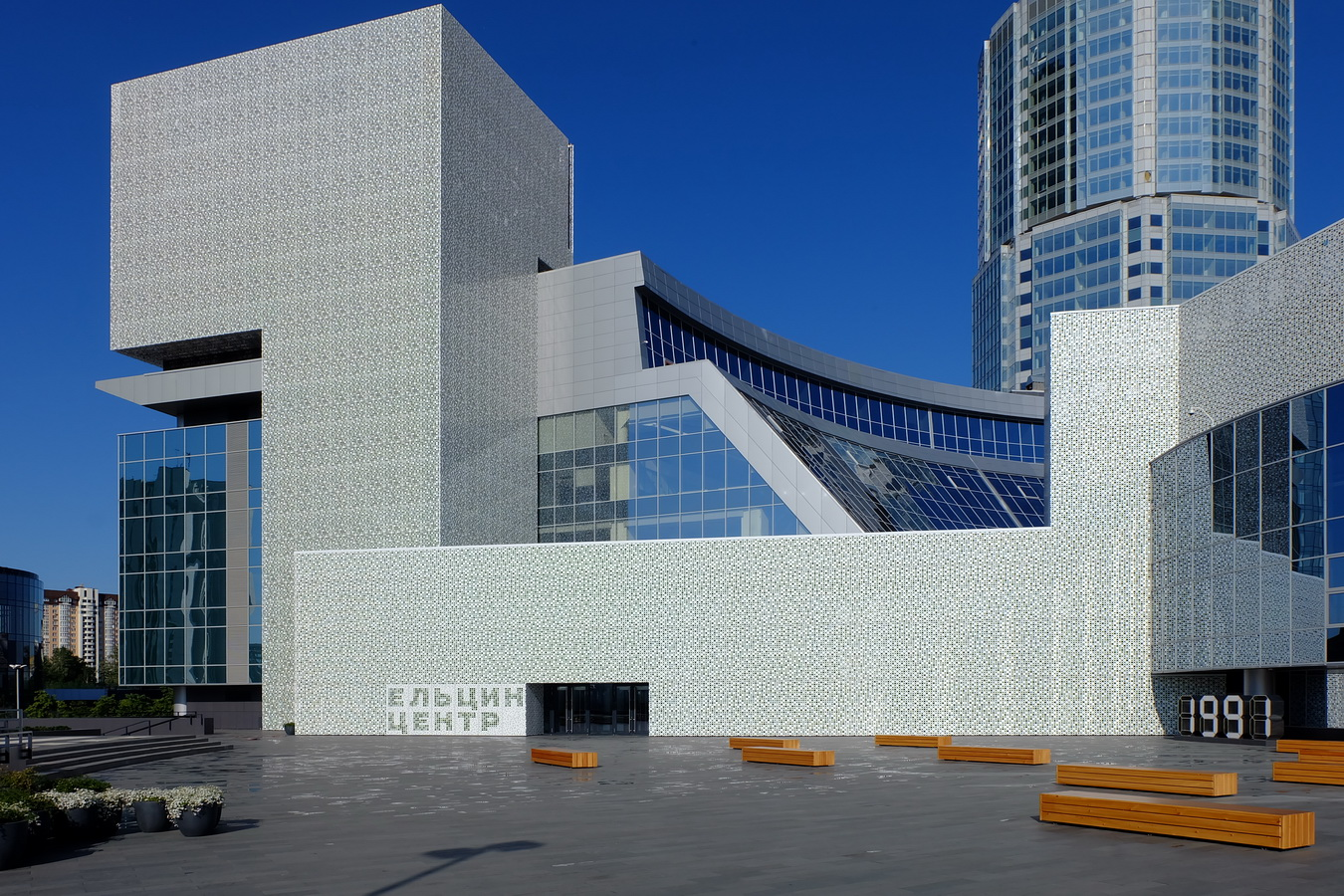 Вход в Ельцин Центр